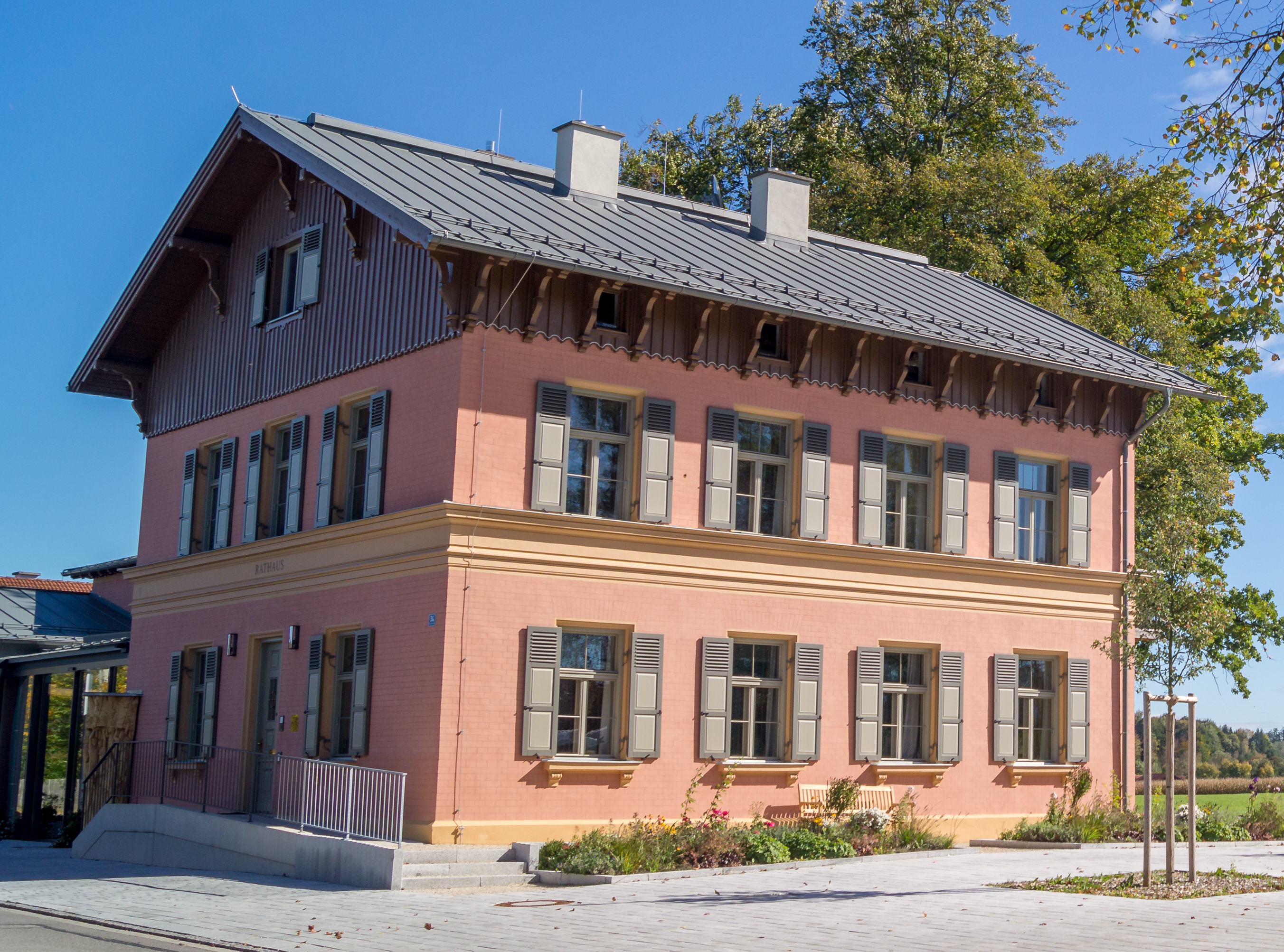 Rathaus der Gemeinde Iffeldorf an der Staltacher Straße, sogenanntes „Deichstetterhaus“, von Westen.